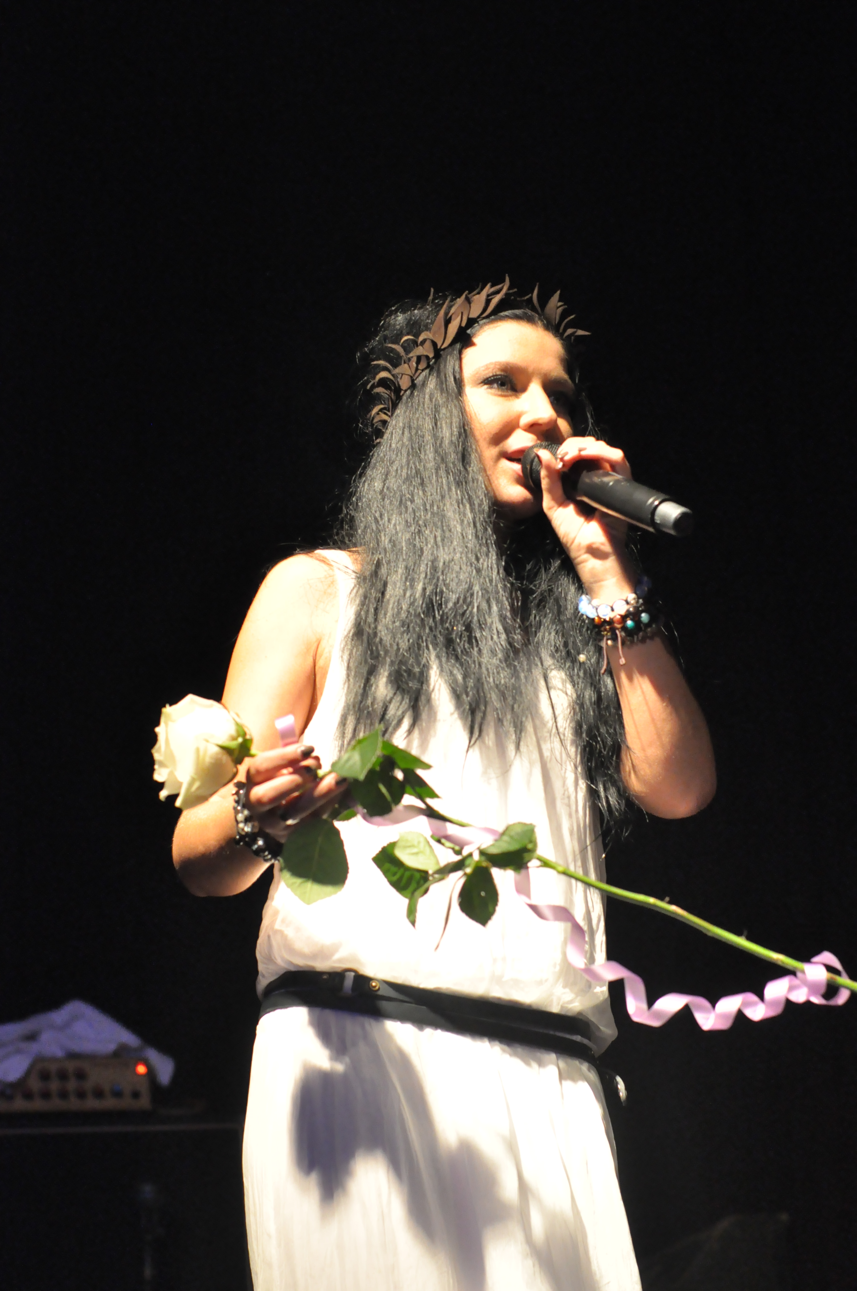 Певица Ёлка